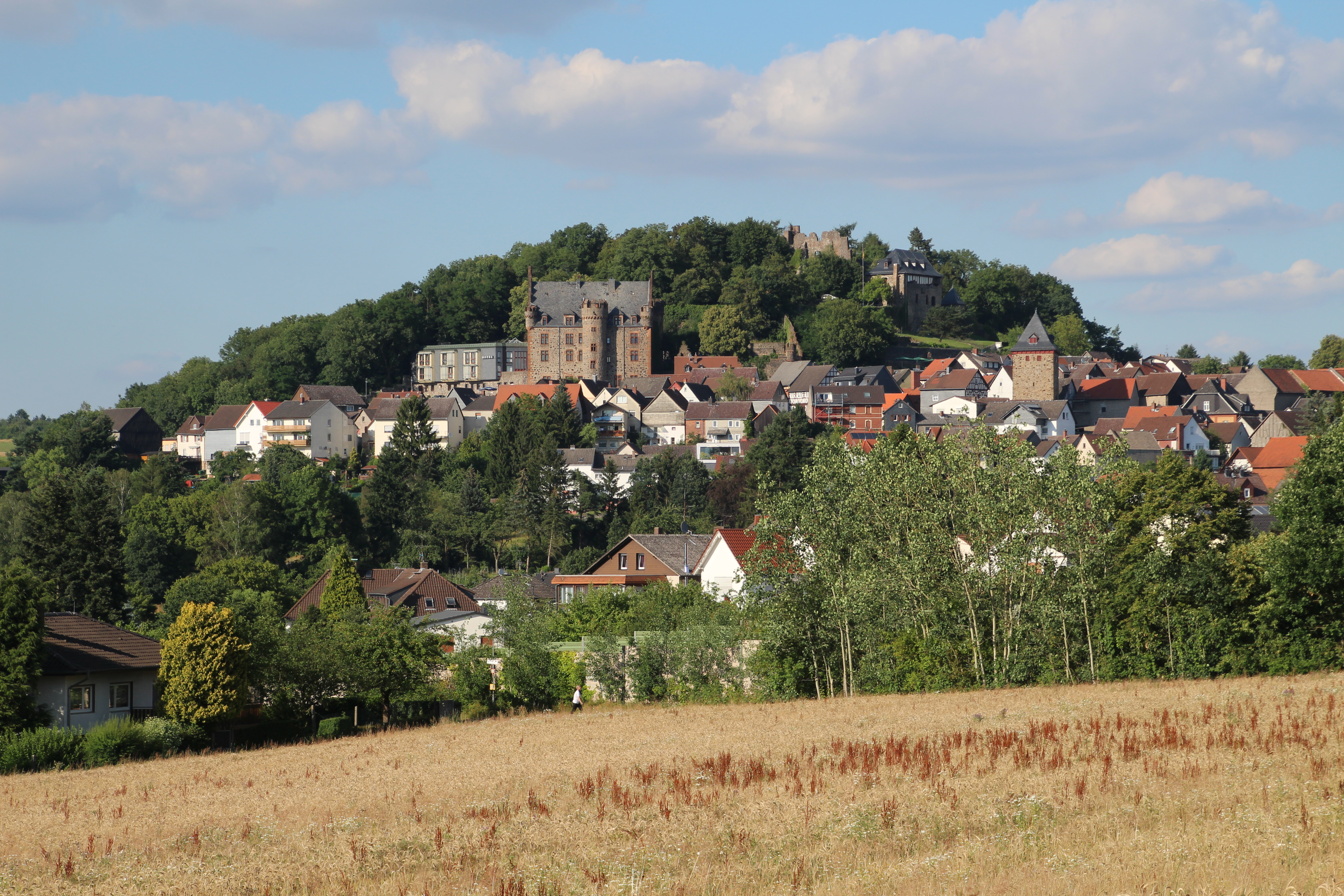 Siehe Foto, Dateiname, Kategorien u. ggf. Geo-Koordinaten